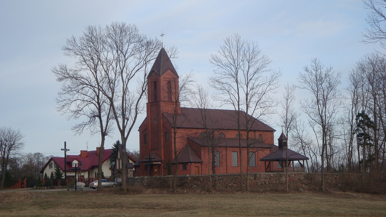 Kościół rzymskokatolicki p.w. Trójcy Świętej w Wiśniewie